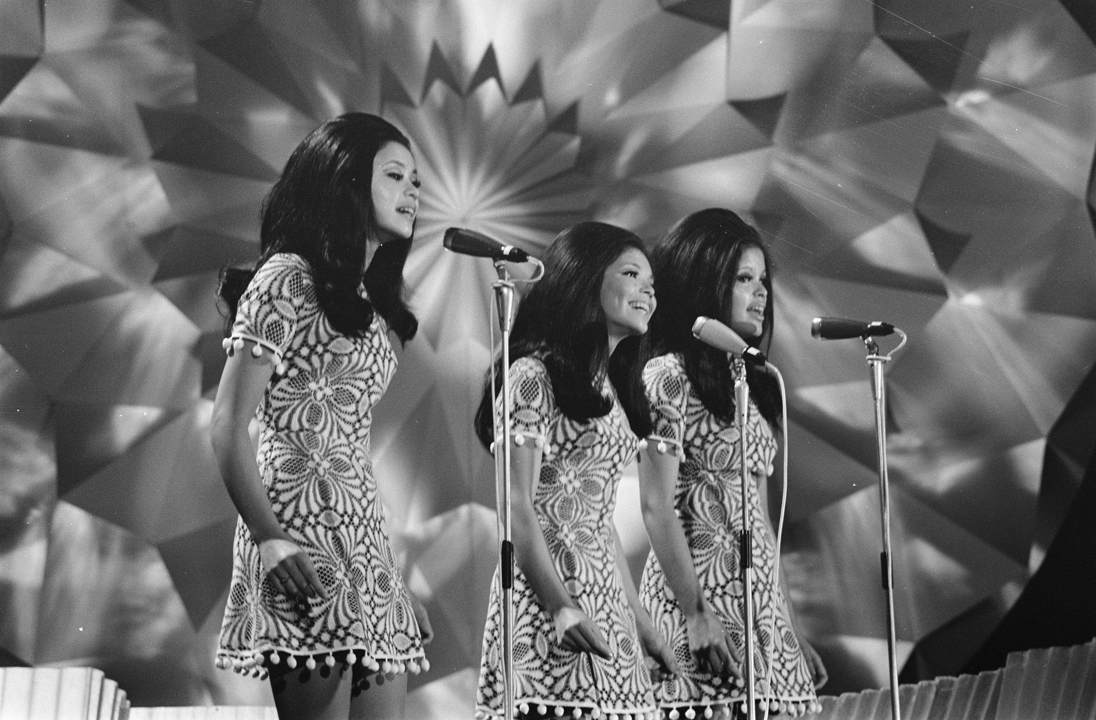 Collectie / Archief : Fotocollectie Anefo Reportage / Serie : [ onbekend ] Beschrijving : The Hearts of Soul , winnaars op Nederlandse finale Eurovisie Songfestival in Den Haag . The Hearts of Soul tijdens optreden Datum : 11 februari 1970 Locatie : Den Haag, Zuid-Holland Trefwoorden : popmuziek, songfestivals, zangers Instellingsnaam : Eurovisie Song Festival Fotograaf : Verhoeff, Bert / Anefo Auteursrechthebbende : Nationaal Archief Materiaalsoort : Negatief (zwart/wit) Nummer archiefinventaris : bekijk toegang 2.24.01.05 Bestanddeelnummer : 923-2493